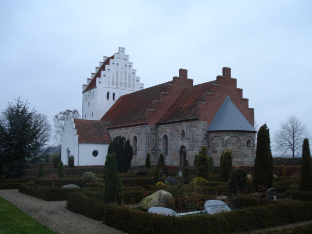 Gosmer Church, Jutland, Denmark